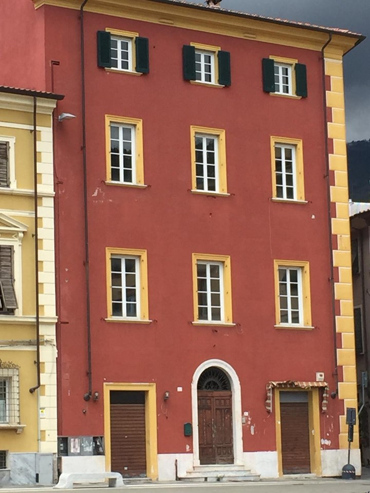 ksksl